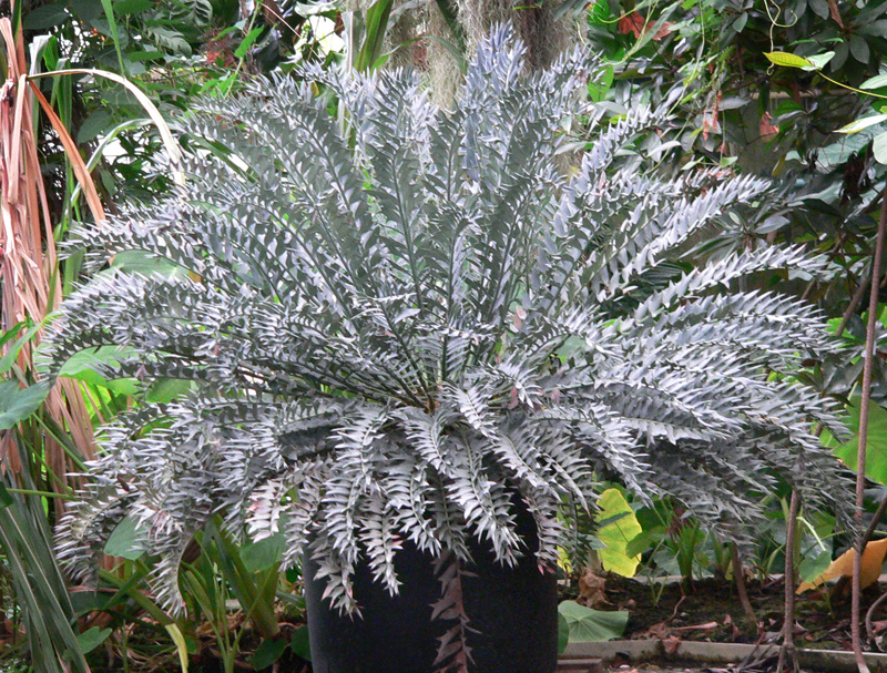 Encephalartos horridus